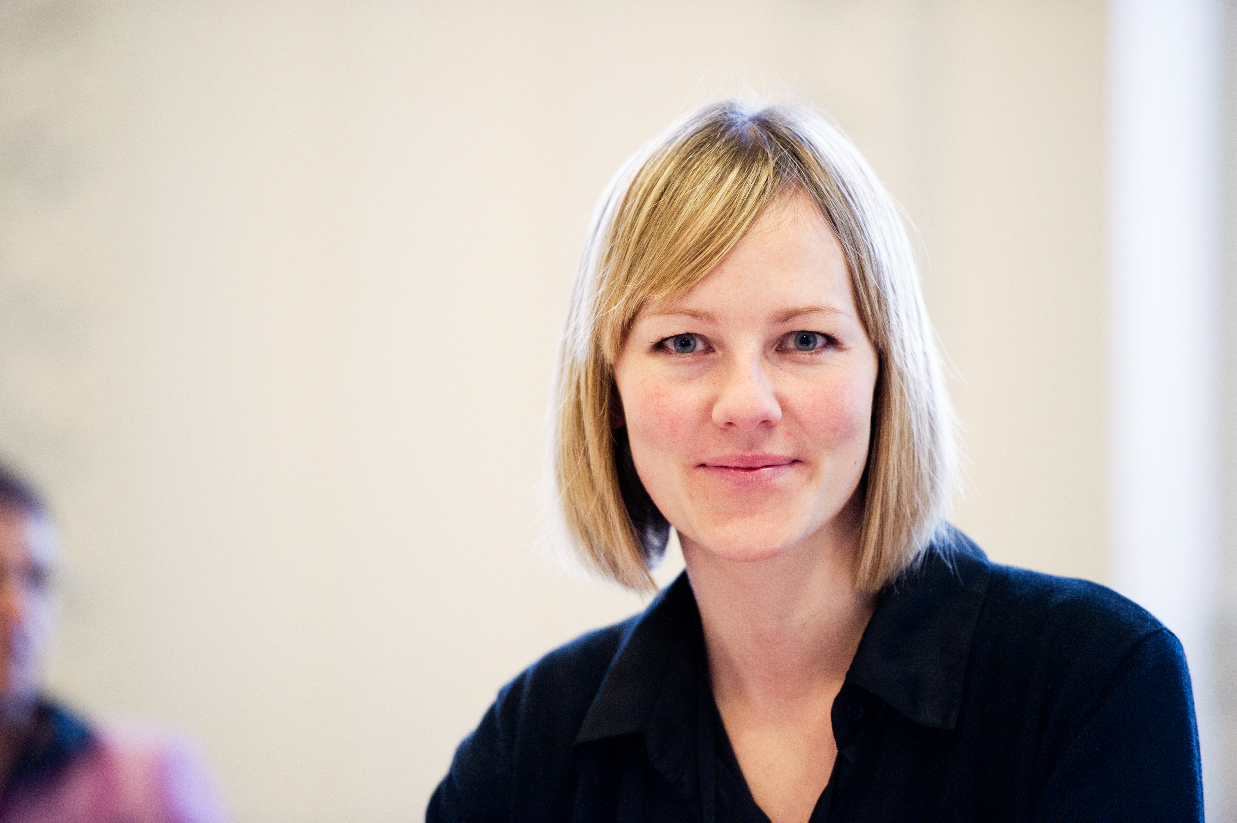 Ida Auken (SF) miljöminister Danmark. Nordiska rådets session i Köpenhamn 2011